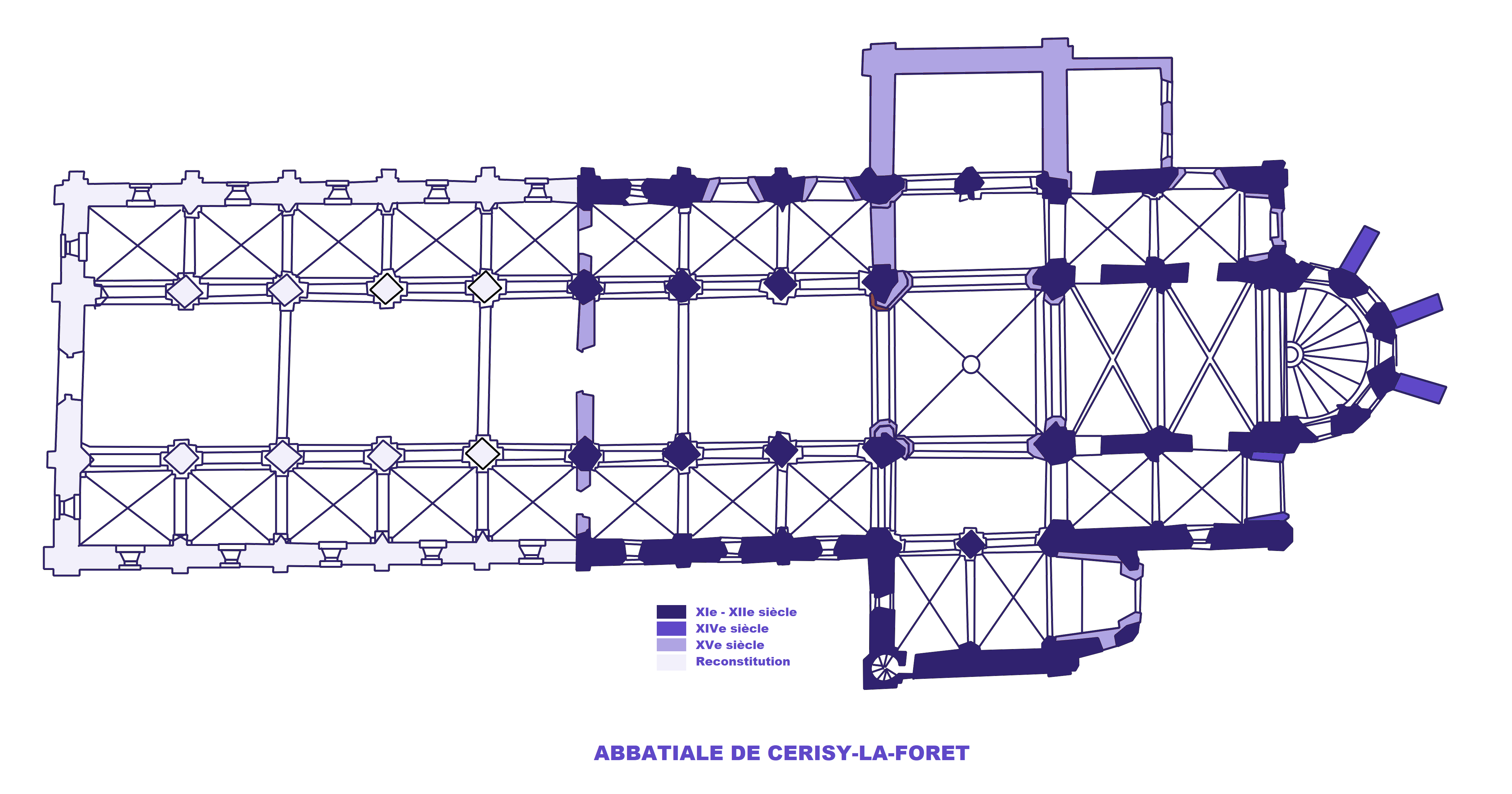 Abbatiale de Cerisy-la-Forêt, Plan (image Commons modifiée)